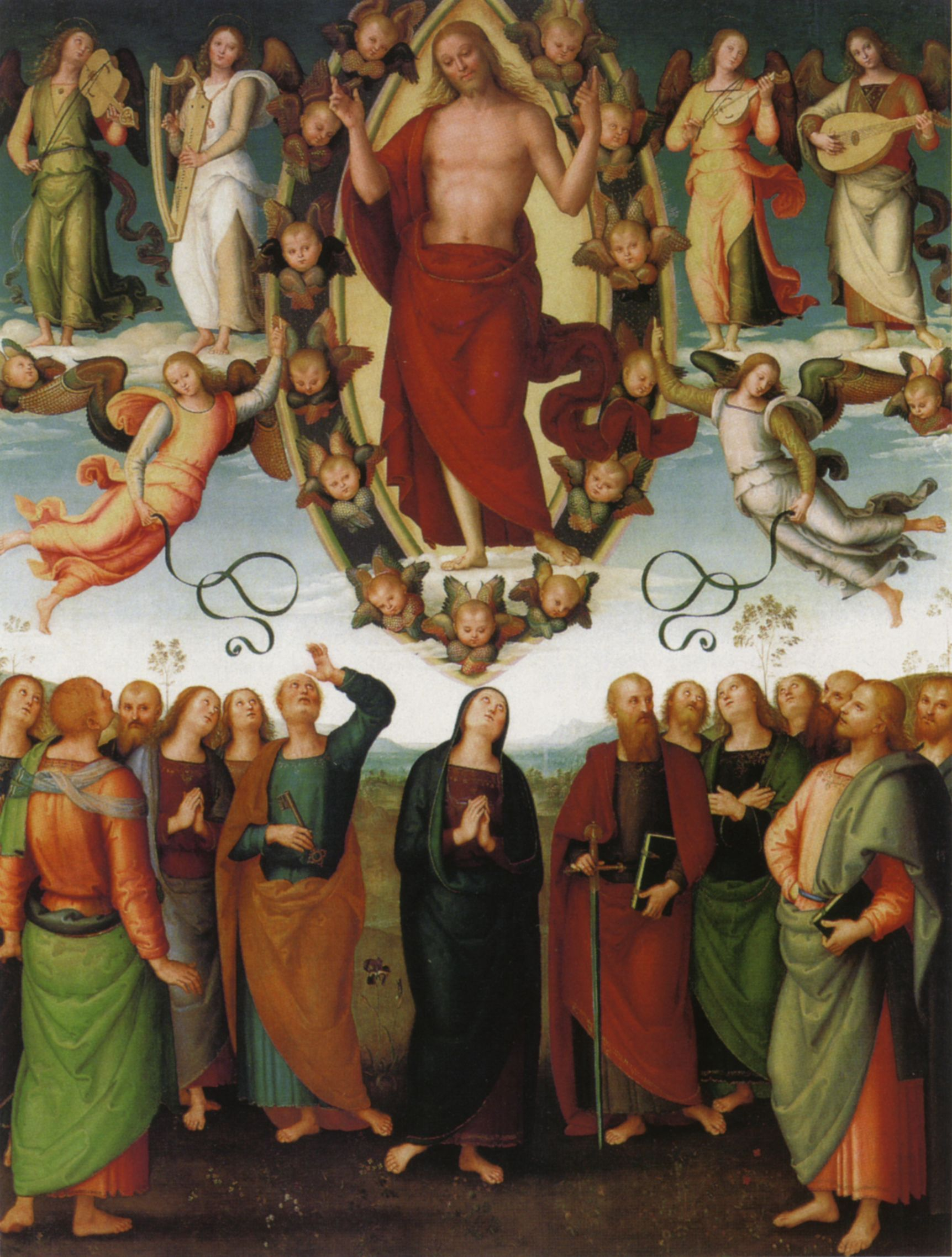 Pietro Perugino: Ascensione di Cristo. Cat. no. 75 in Vittoria Garibaldi: Perugino. Catalogo completo. Octavo, Firenze 2000, ISBN 88-8030-091-1